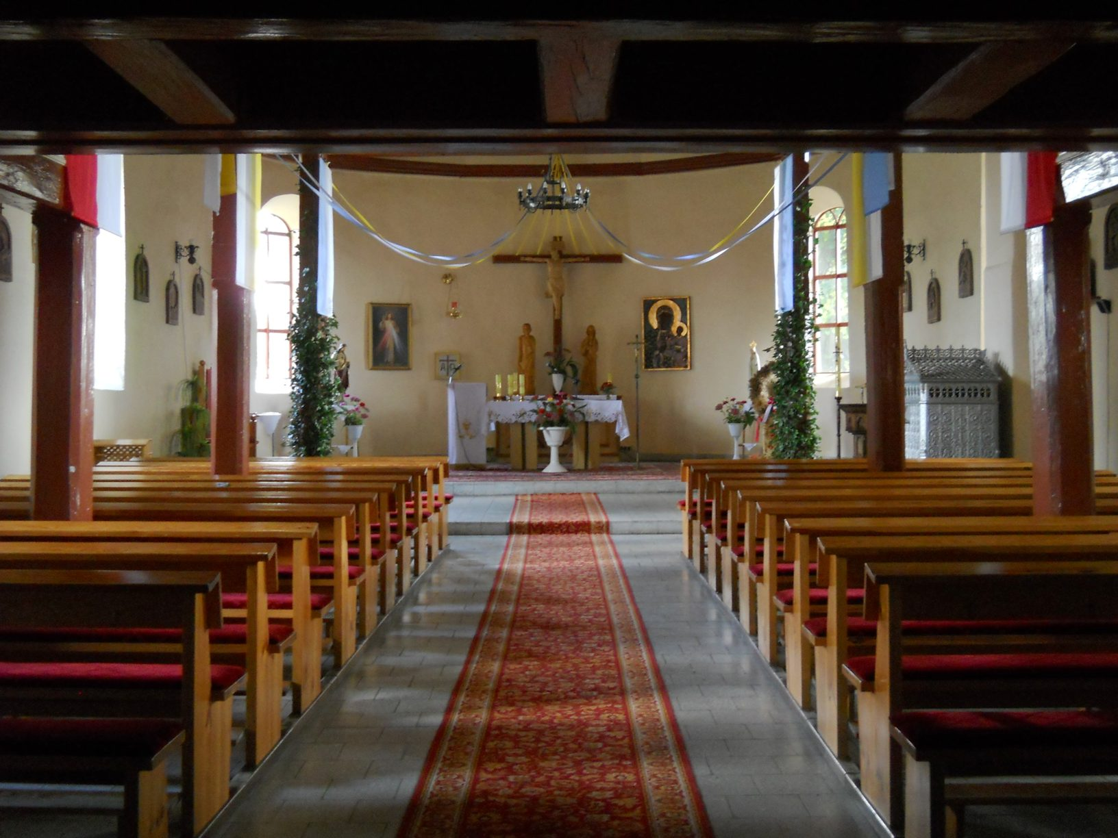 Kościół w Wojcieszycach. Wnętrze.